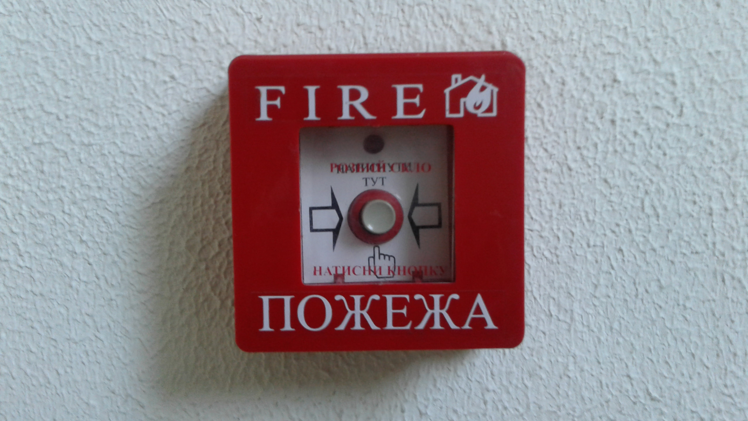 Автосервісний центр, Миколаїв